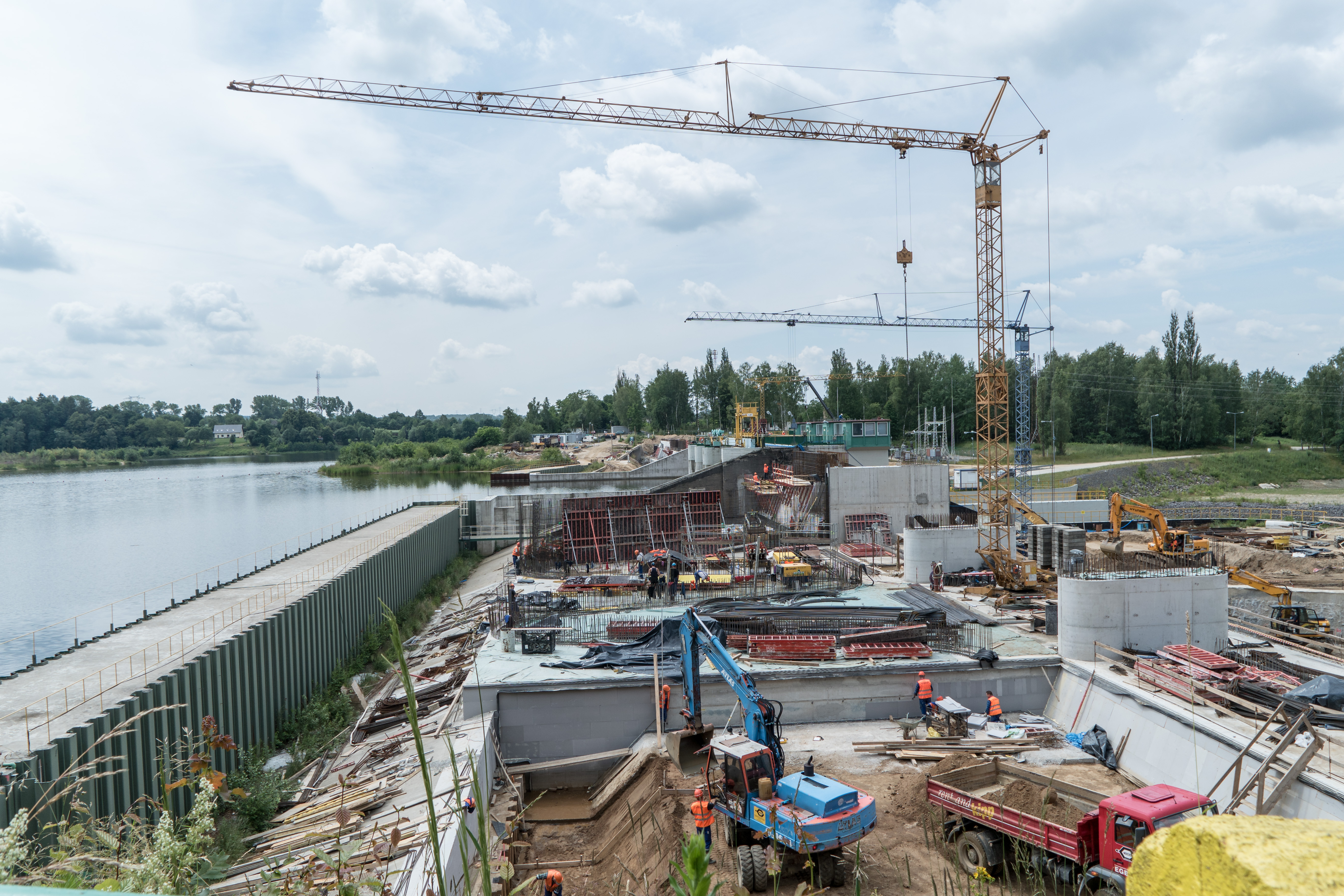 Neubau Staudamm Witka-Stausee (Stand 2015/06)